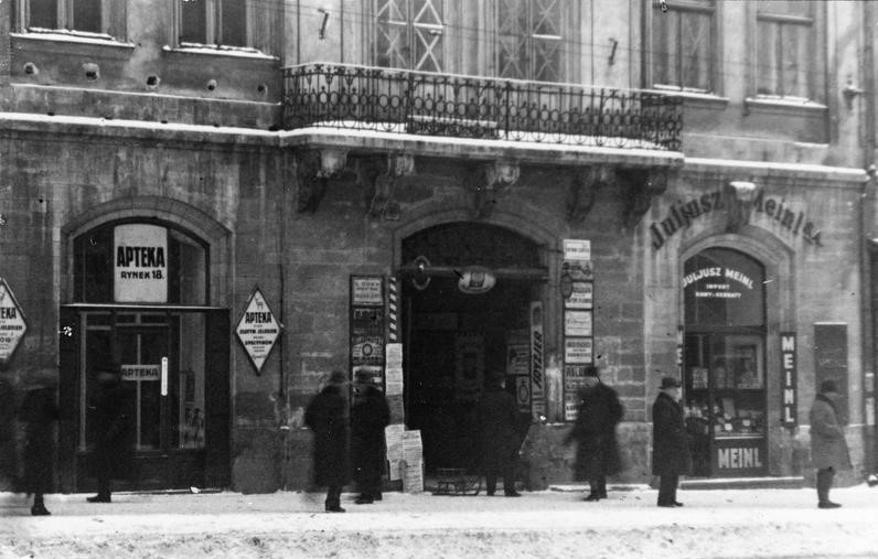 Juliusz Meinl